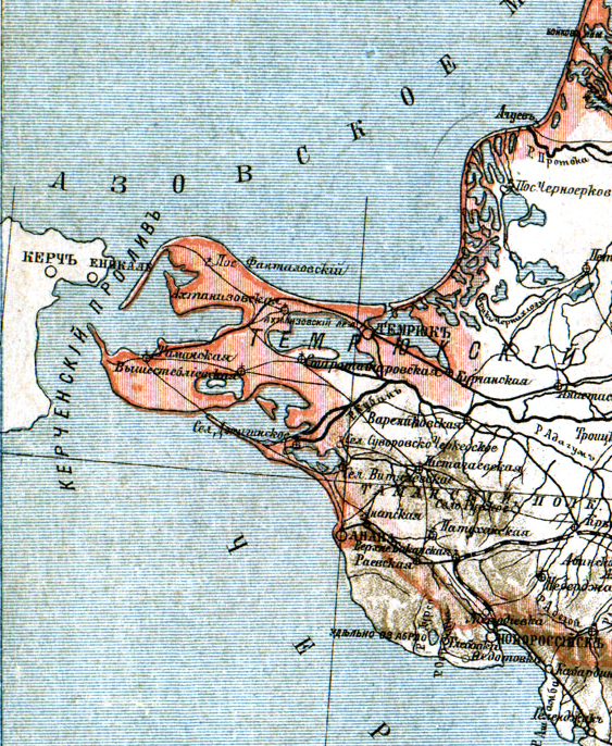 Часть карты